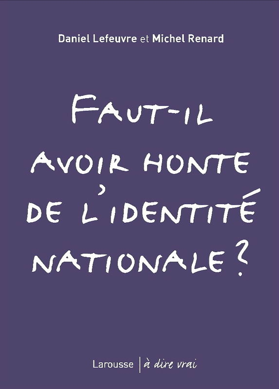 "Faut-il avoir honte de l'identité nationale ?", Daniel Lefeuvre et Michel Renard, 2008.